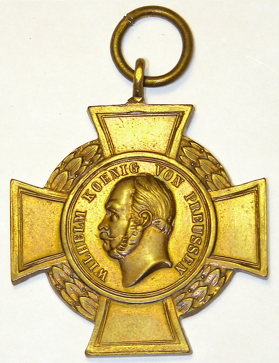 Alsenkreuz 1864